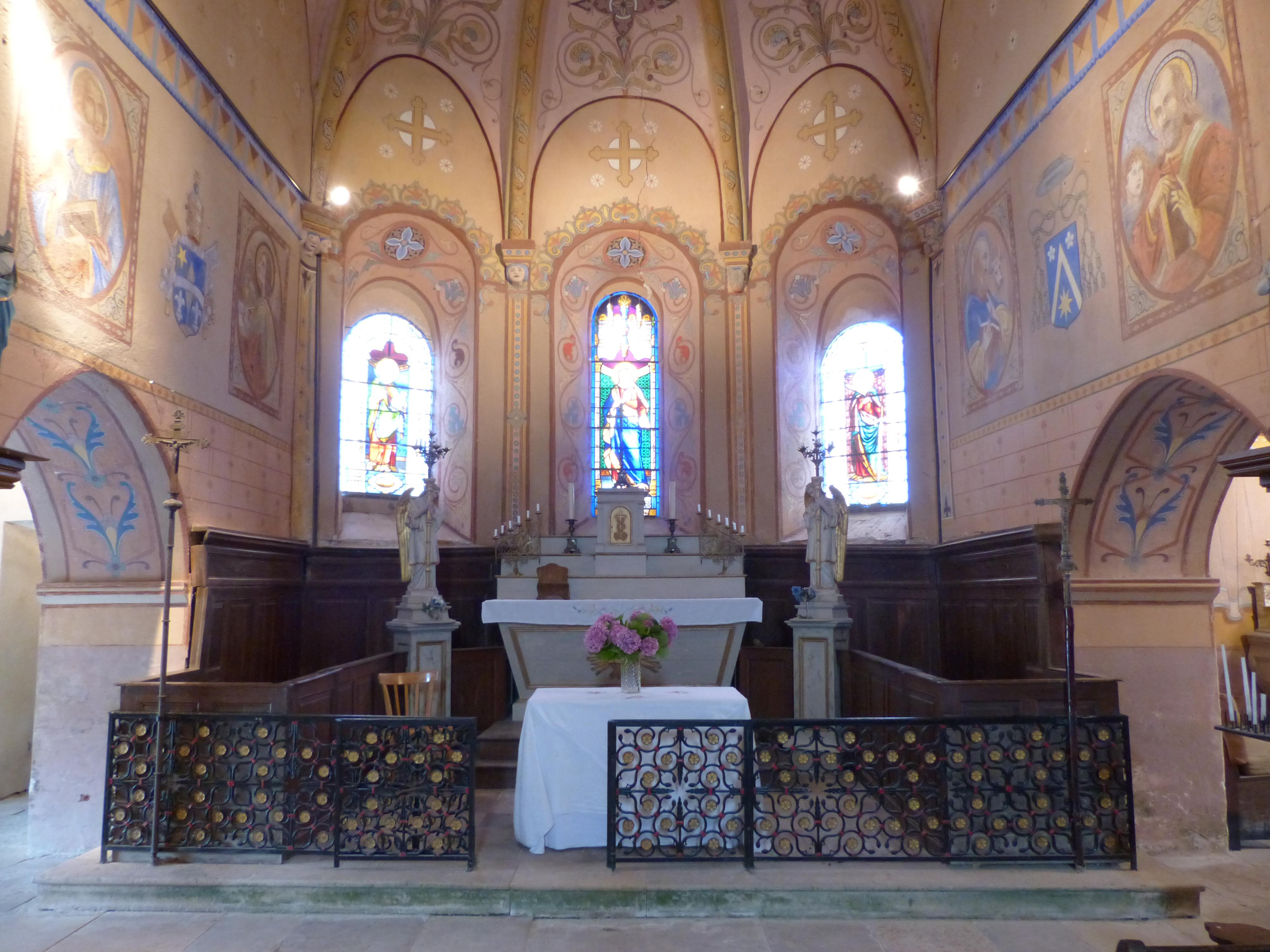 Église de Nades, Allier (France). Vue d'ensemble du chœur.